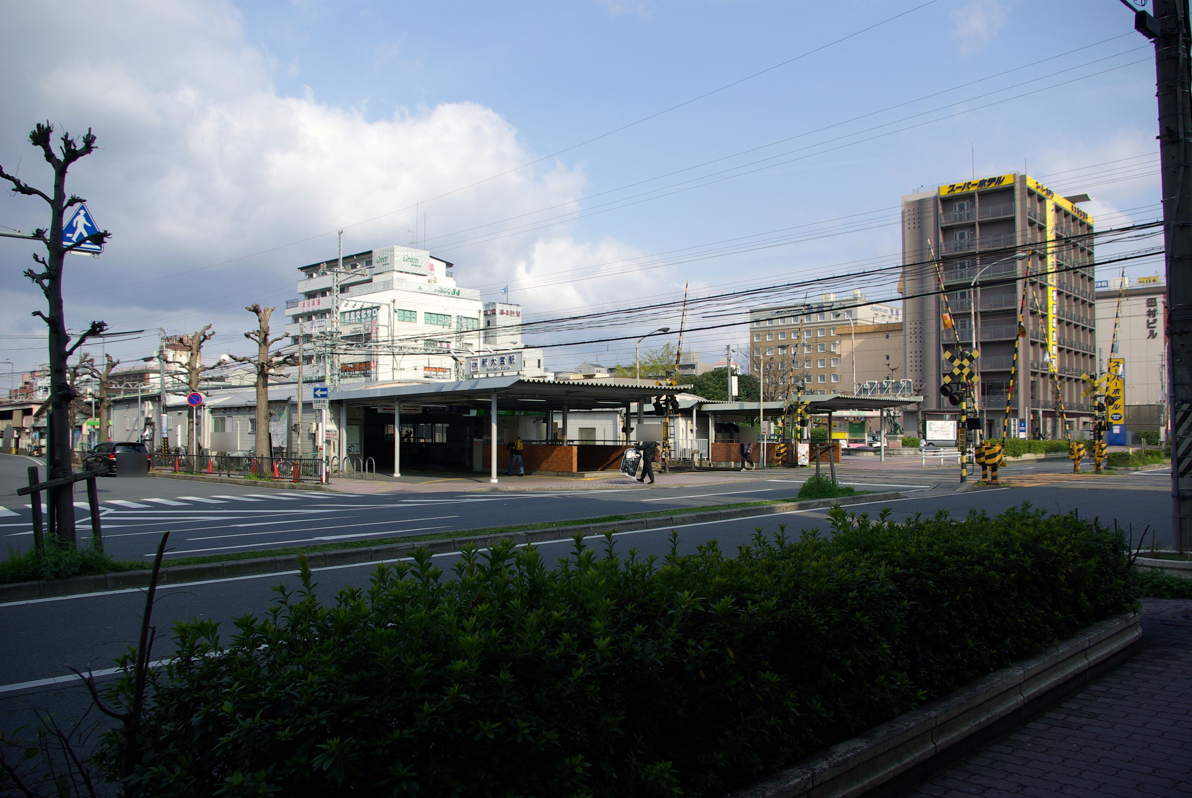 近鉄奈良線新大宮駅